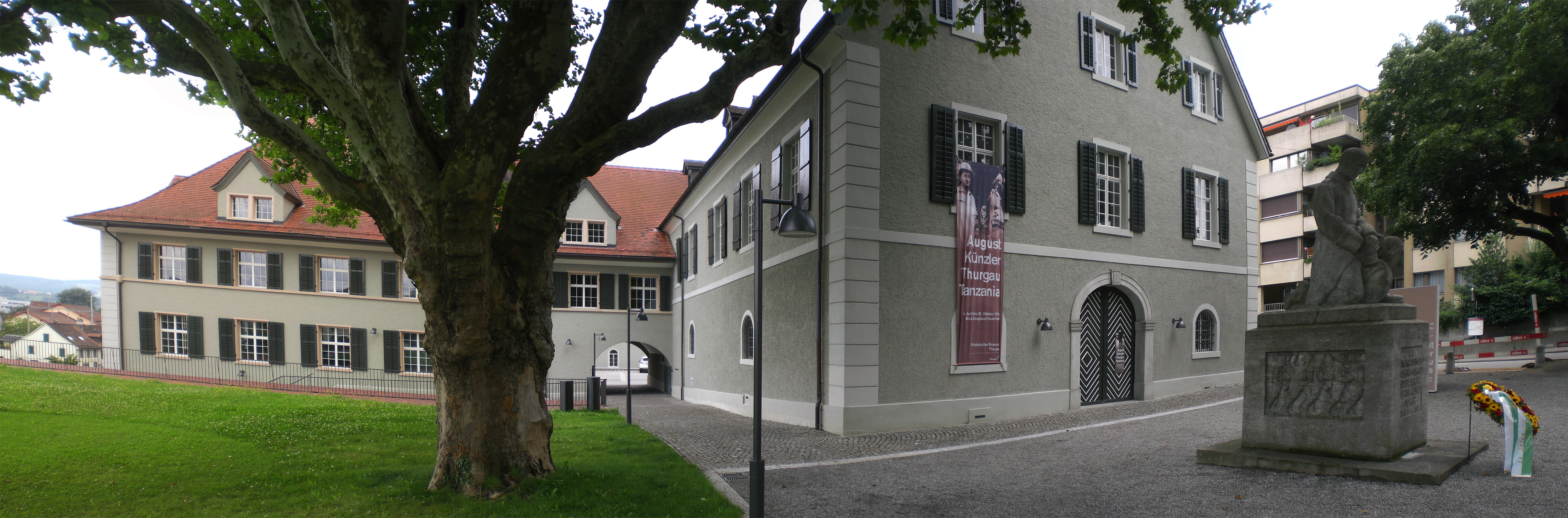 Frauenfeld (TG) ehemaliges Zeughaus mit Soldatendenkmal